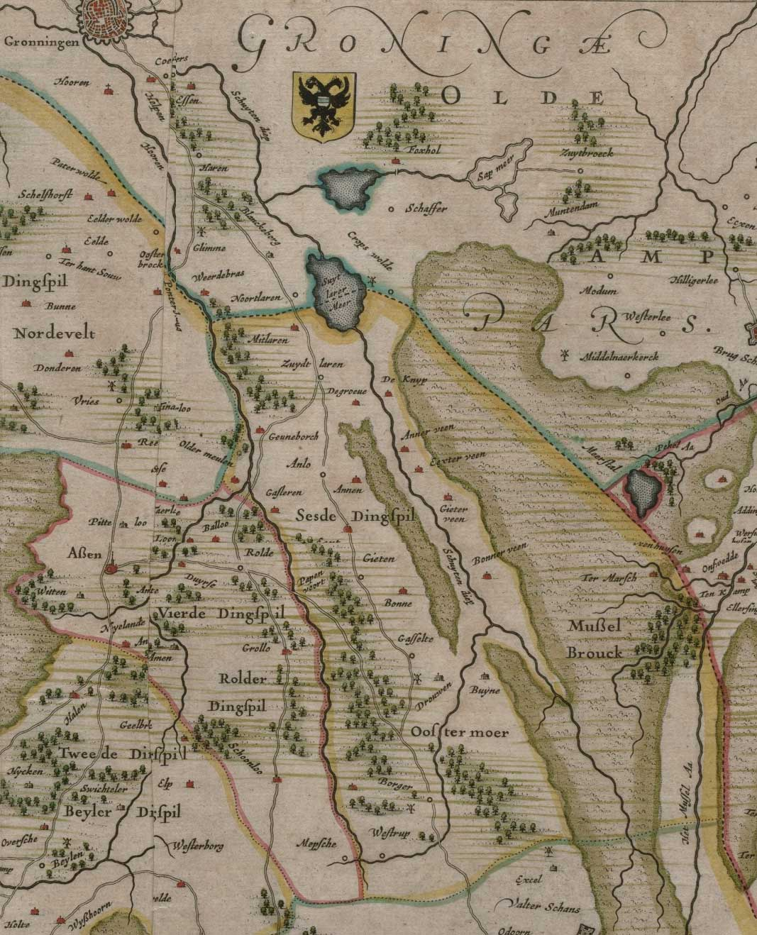 Oude kaart van Drenthe uit 1634 (fragment)